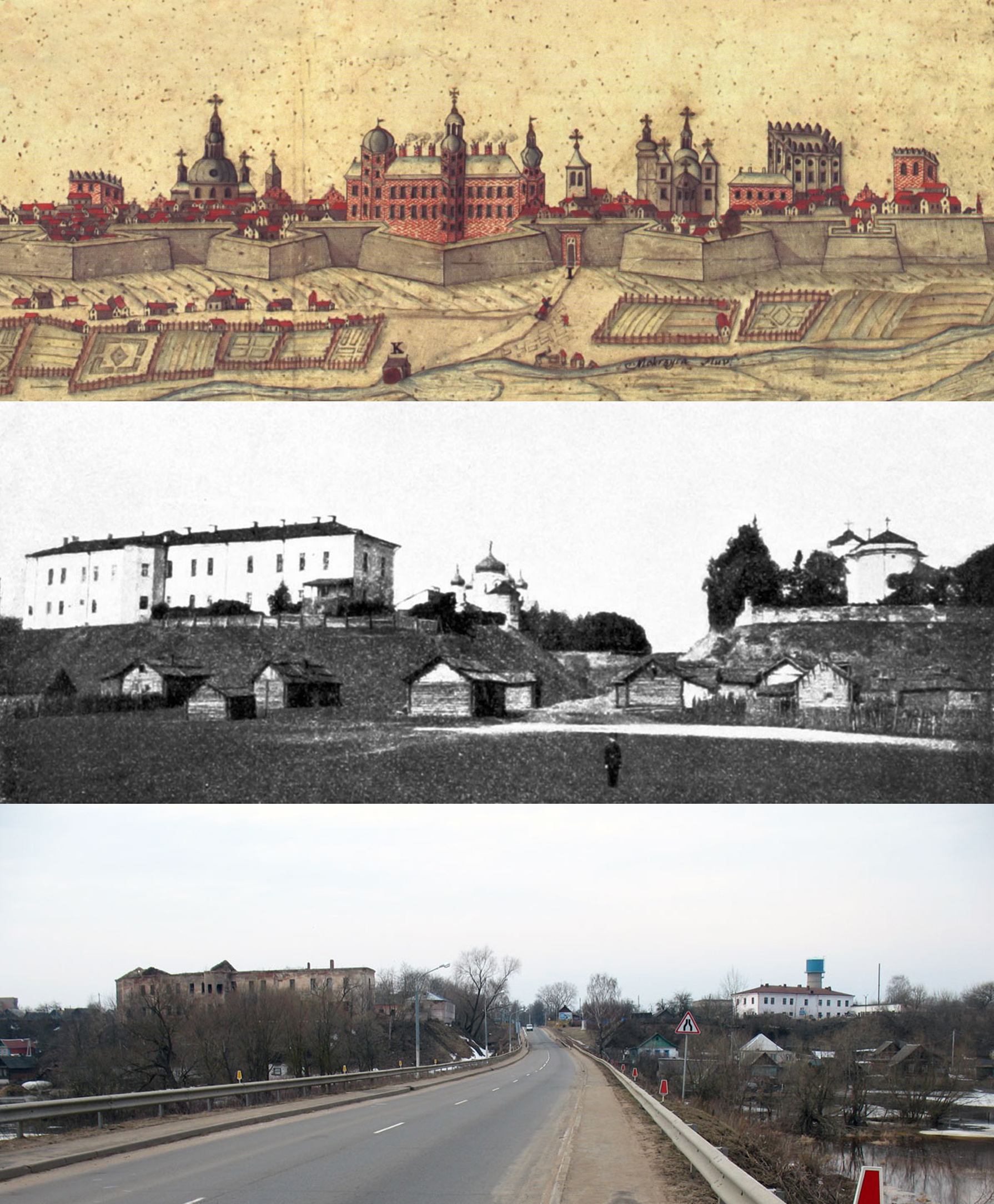 Беларуская (тарашкевіца): Маскалізацыя (русіфікацыя) Вялікага Княства Літоўскага. Места Быхаў Аршанскага павету. Дэградацыя архітэктурнага аблічча